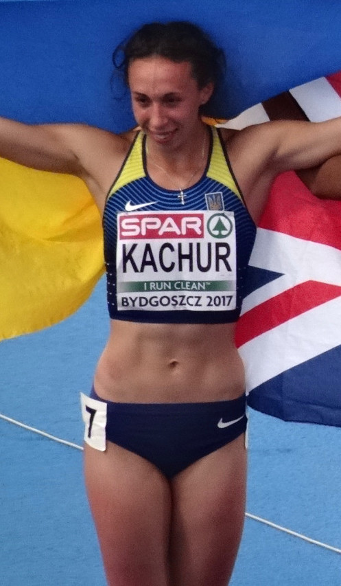 Młodzieżowe Mistrzostwa Europy w Lekkoatletyce U23 w Bydgoszczy 13-16 lipca 2017, finał biegu na 200 m kobiet